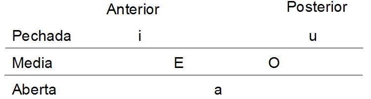 self made